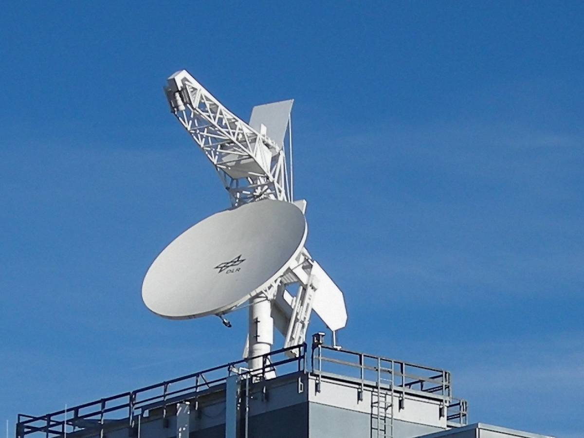 Antenne des für Forschungszwecke entwickleten Wetterradars auf dem Dach des Institutes